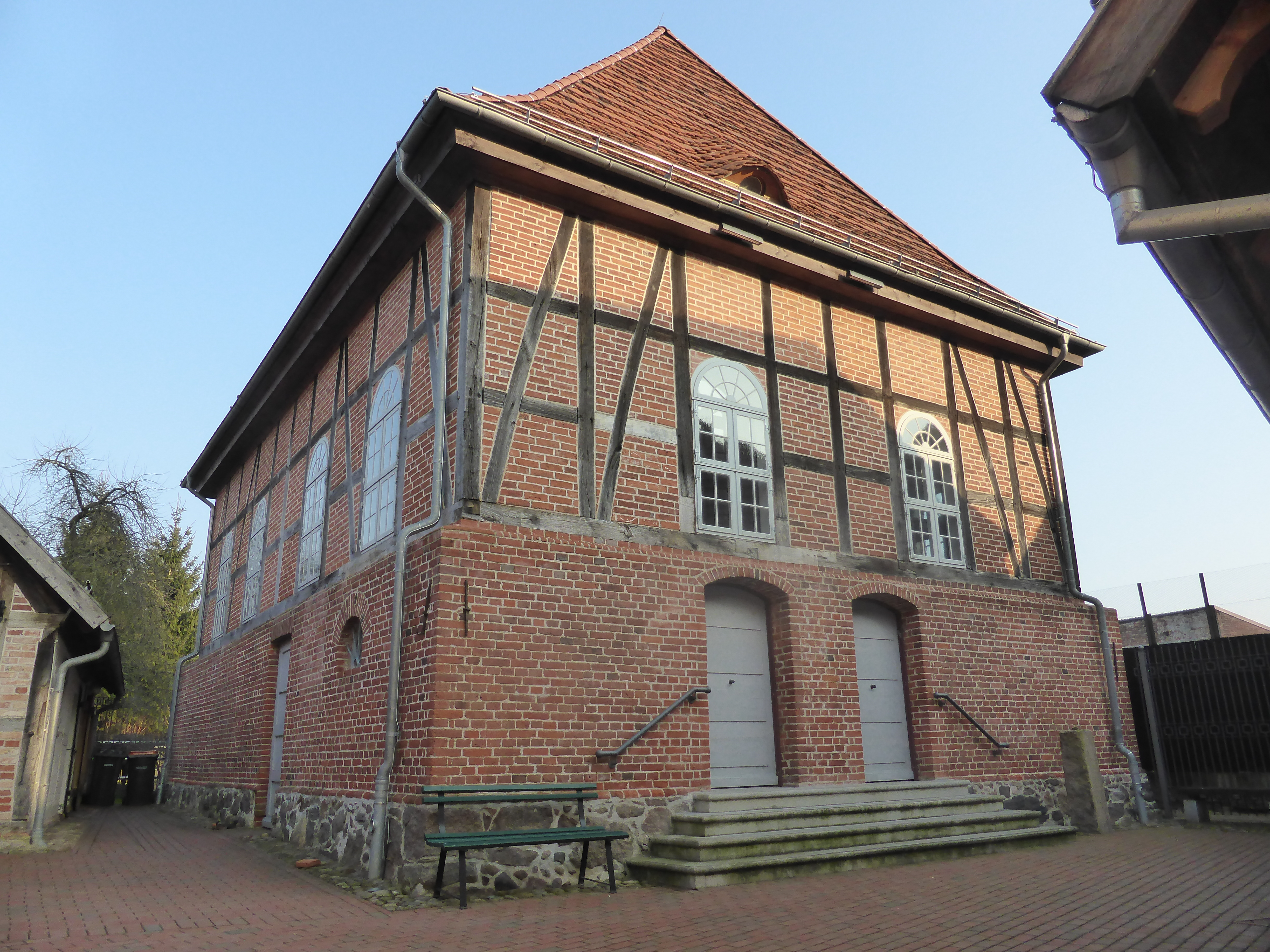 Denkmalgeschützte ehemalige Synagoge in Hagenow, Mecklenburg-Vorpommern. Das Bild zeigt das hinter dem ehemaligen Schul- und Gemeindehaus in zweiter Reihe gelegene Gebetshaus.